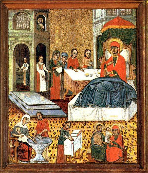 Маларыцкі майстар. Нараджэнне Маці Боскай. 1648-1650. Дошка, яечная тэмпера. 120,5х100х2,3.З в. Ляхаўцы Маларыцкага р-на. НММ РБ